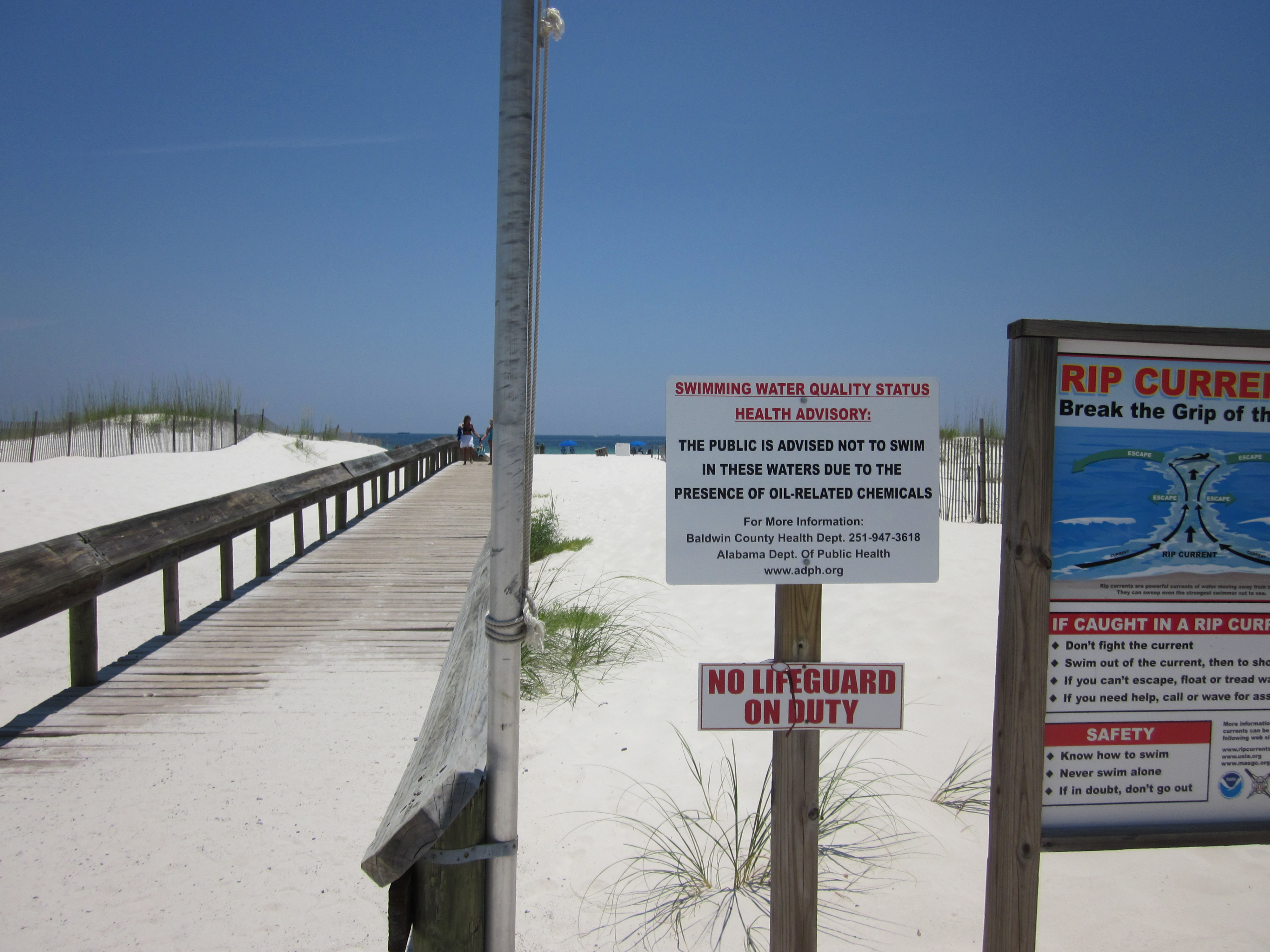 Orange Beach, Alabama